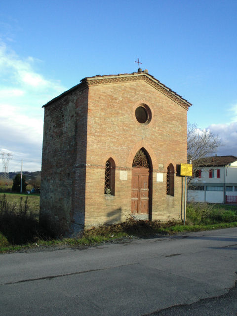 Castelfiorentino (Firenze), Tabernacolo Madonna della tosse